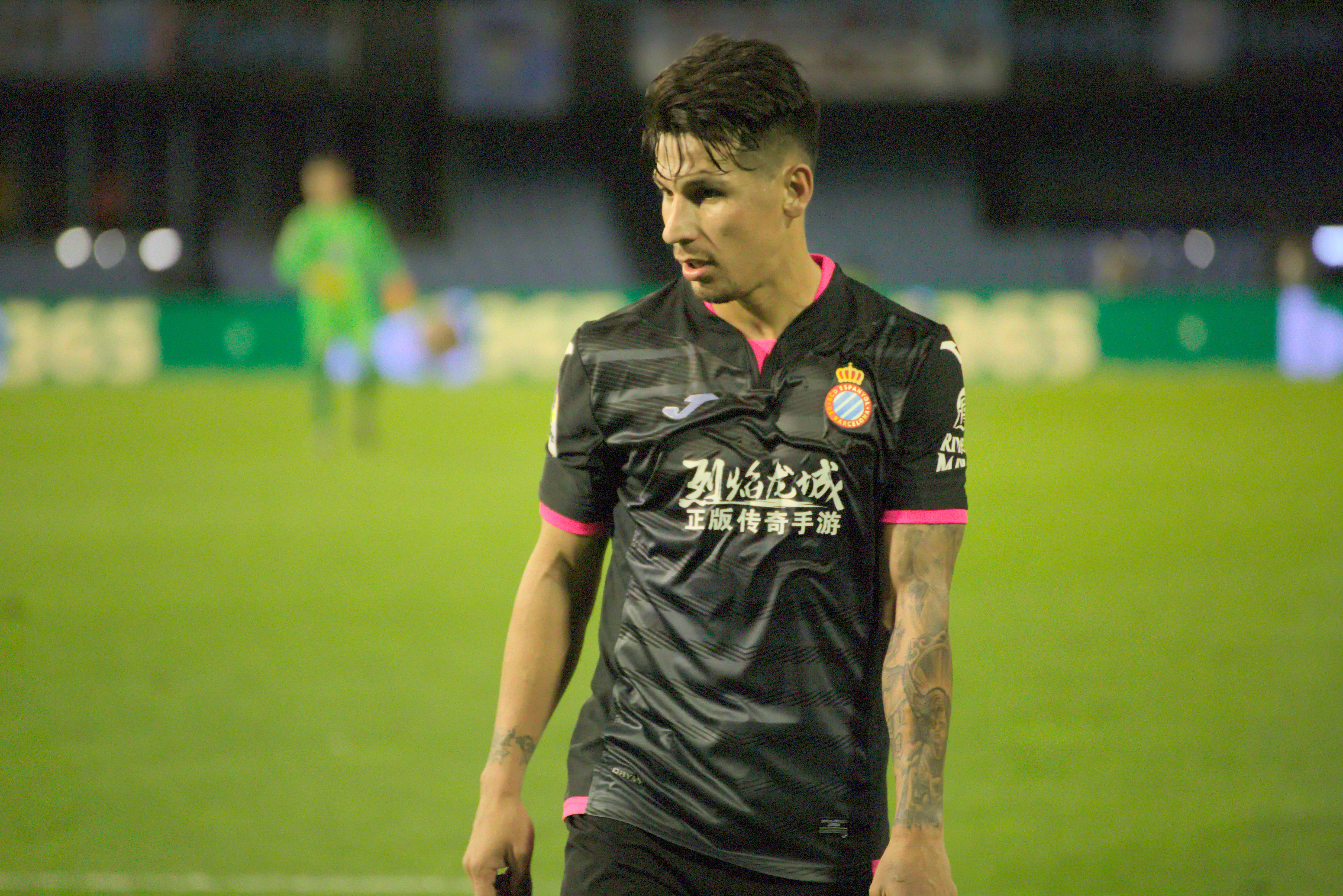 Hernán Pérez - RCD Espanyol